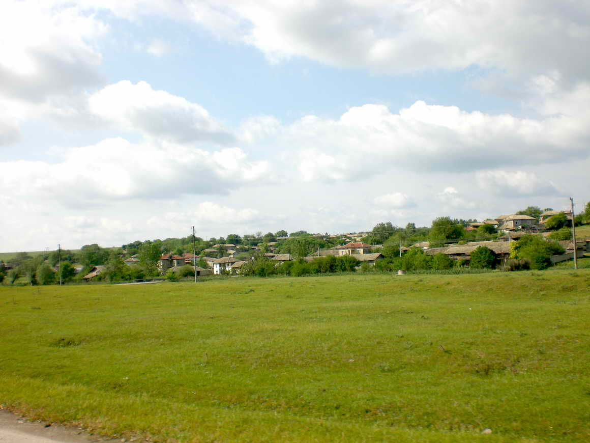 Общ поглед към село Еленово, Поповско - 2007 год.